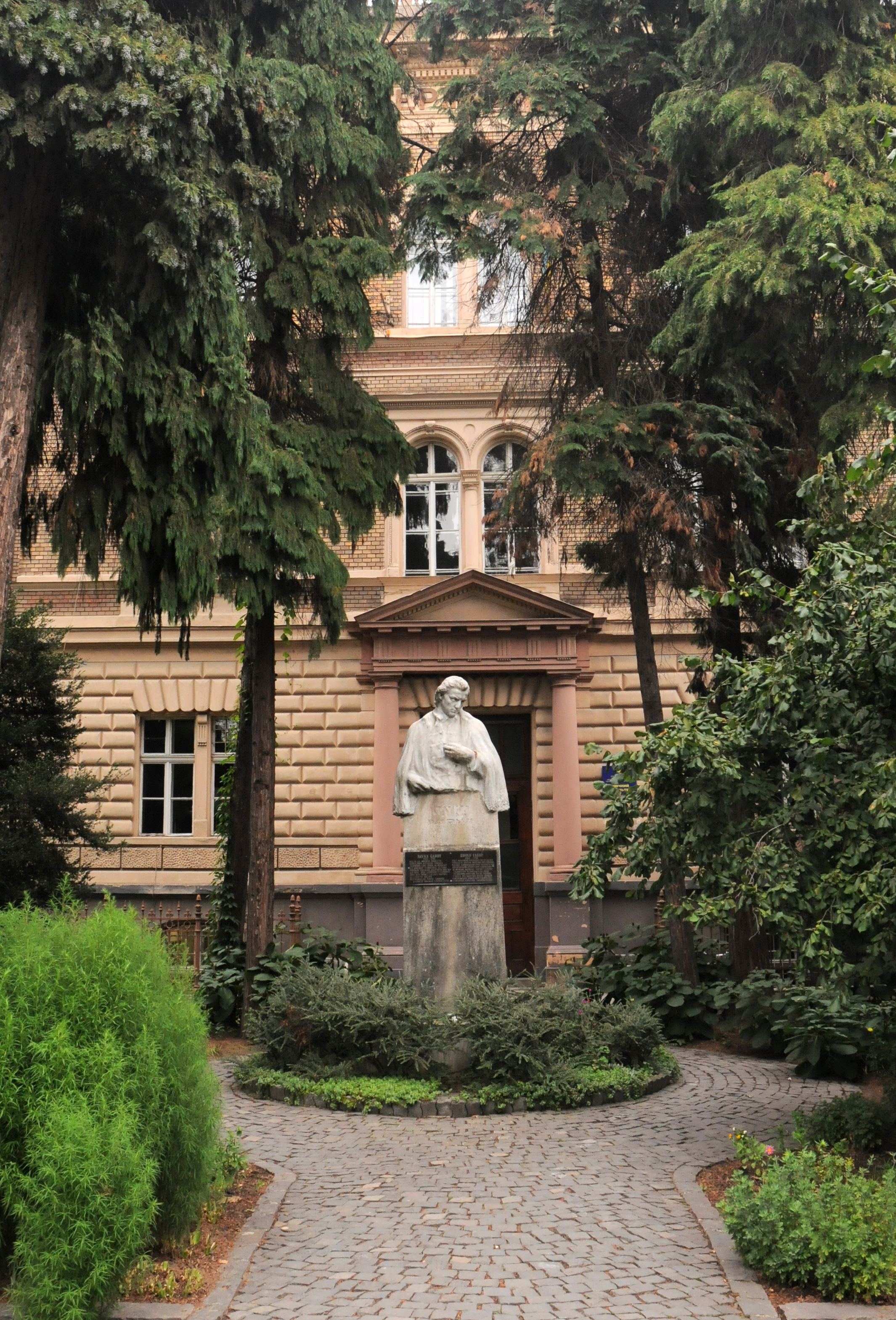 Пам'ятник угорському поету та педагогу Габору Дойко перед хімічним факультетом УжНУ